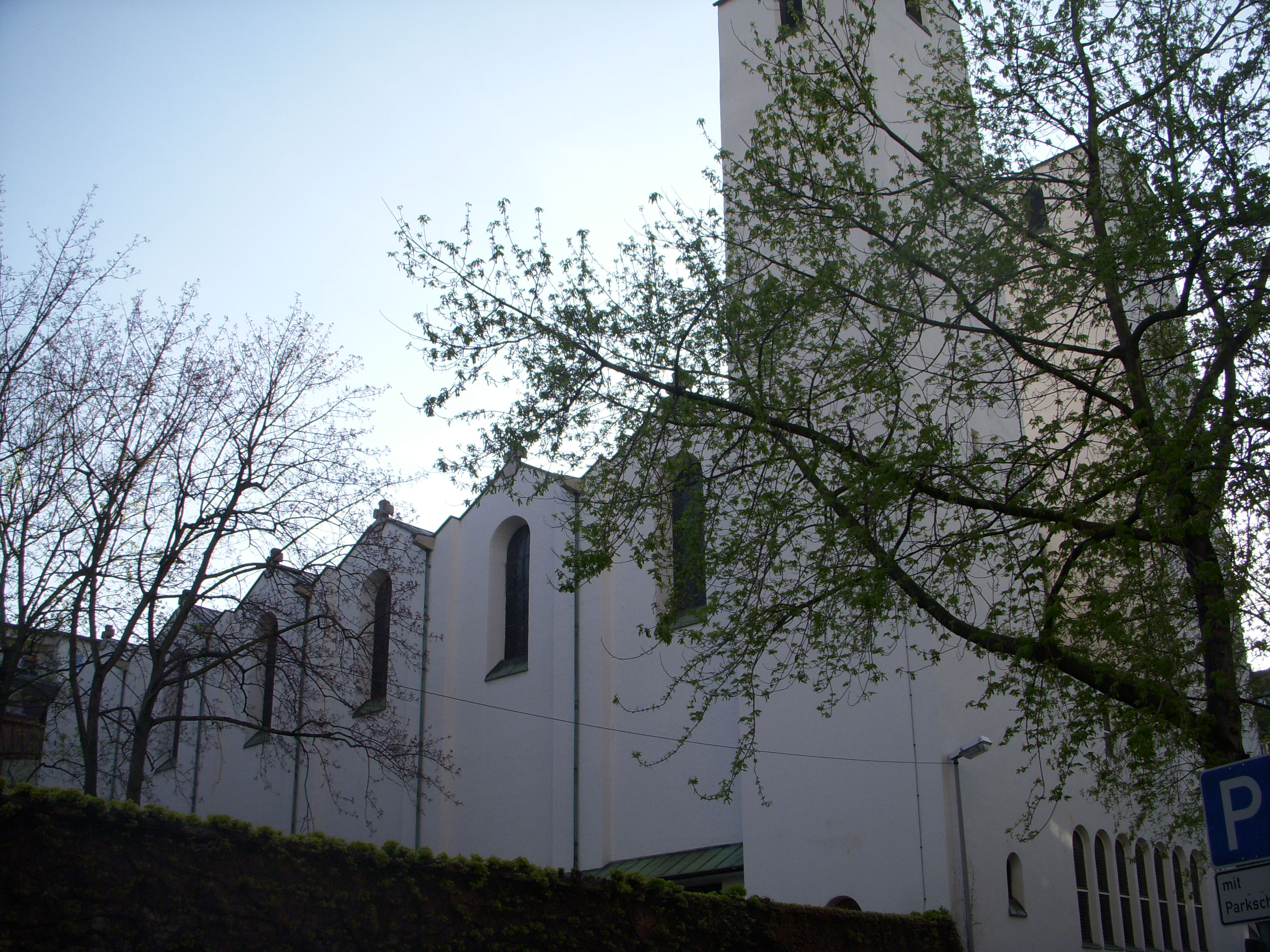 Altmünsterkirche Mainz, Münsterstraße